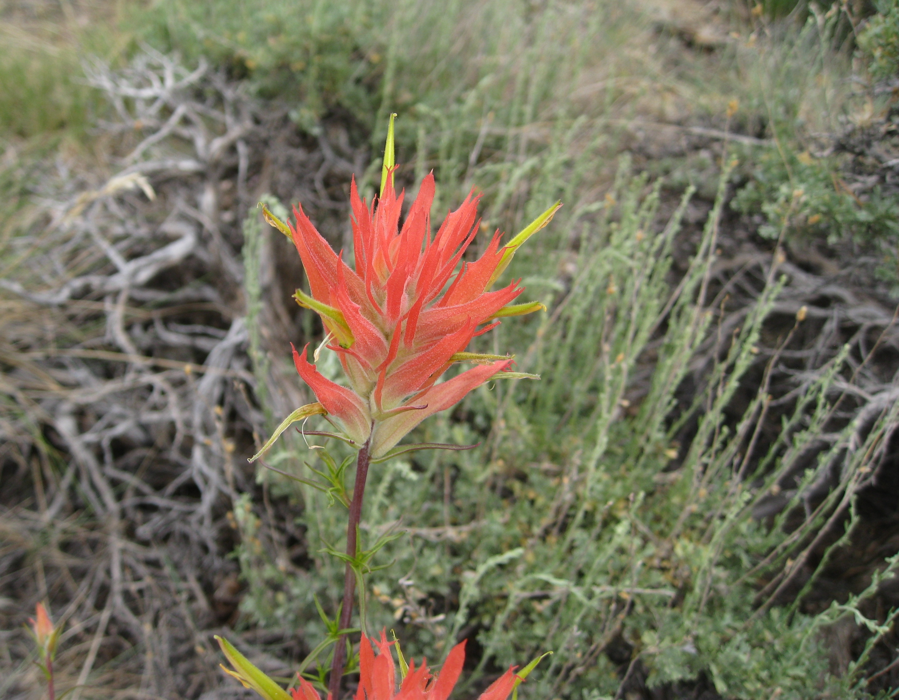 Castilleja linariifolia